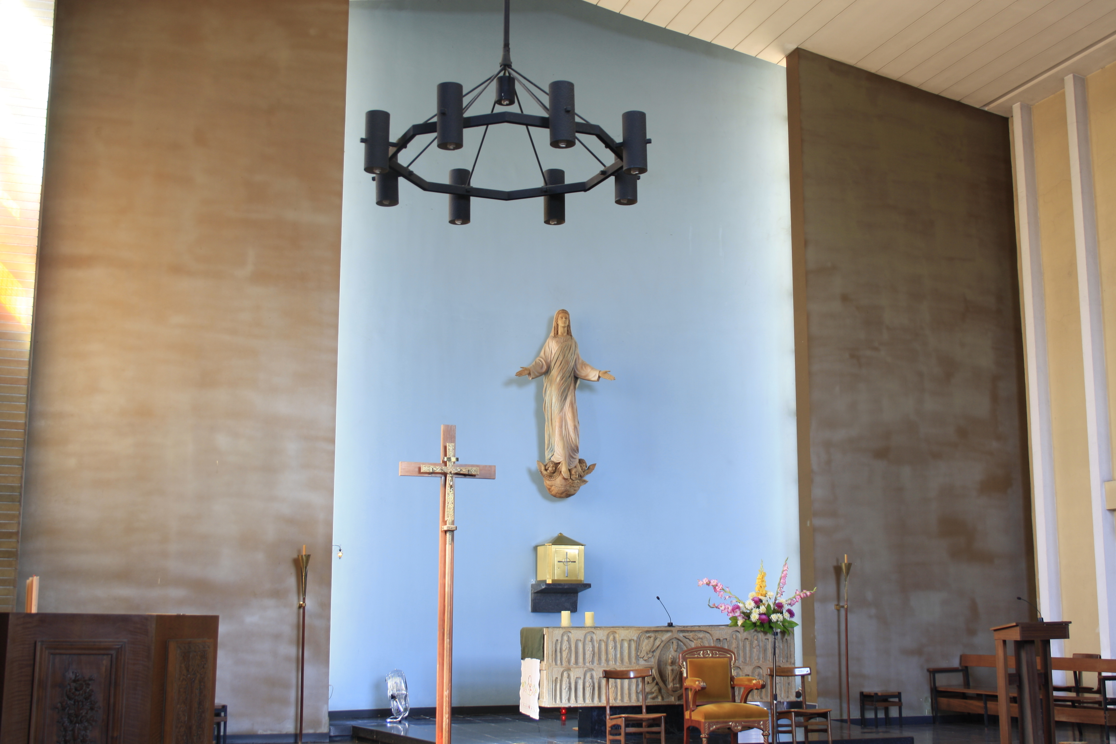 Altar de l'església de Santa Maria de Bassacs amb imatge de Santa Maria feta per l'escultor Lluís Maria Saumells i Panadés